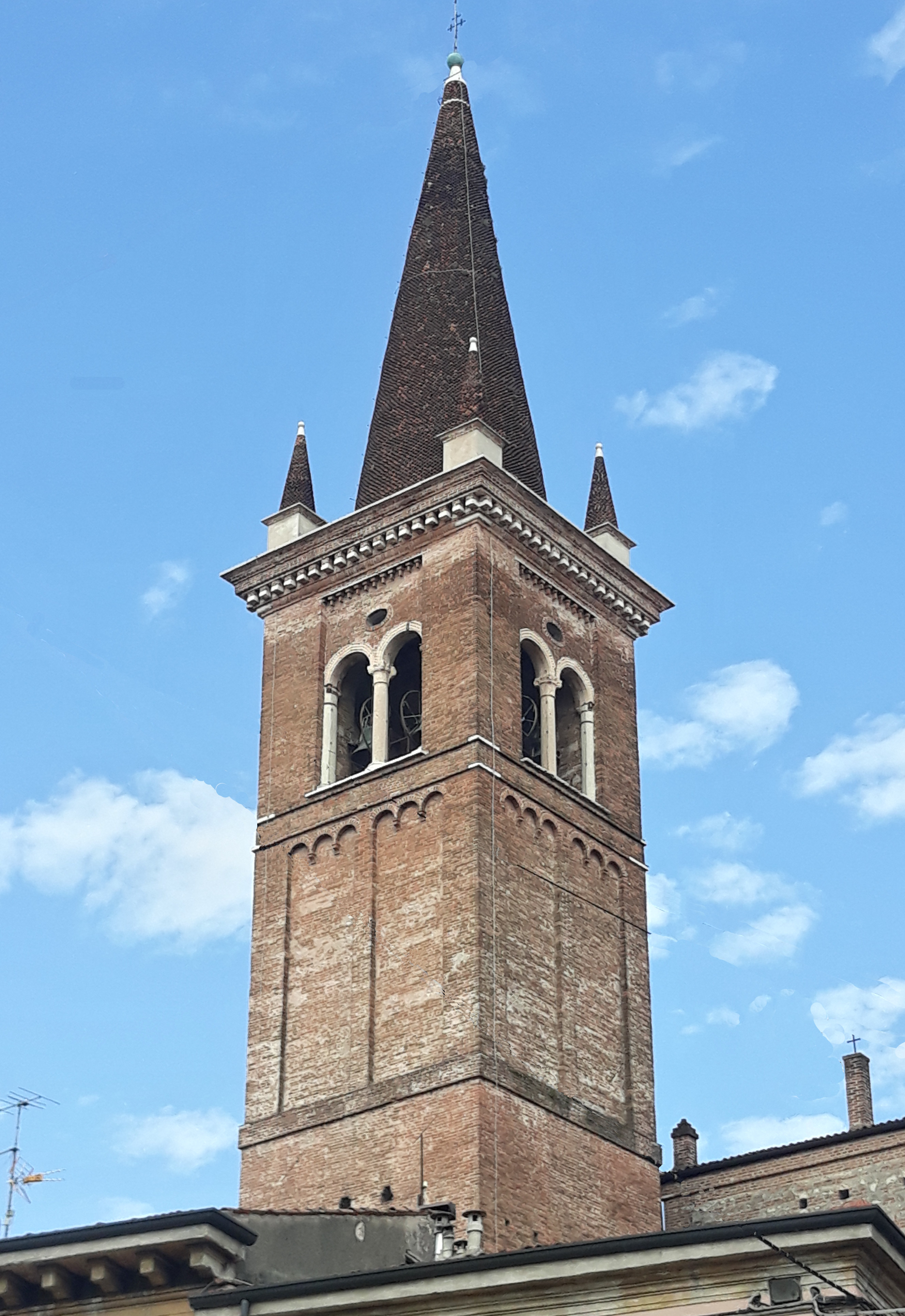 Campanile della Chiesa di San Tomaso Cantuariense